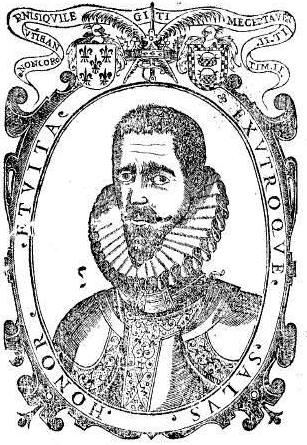 Retrato de Luis Pacheco de Narváez